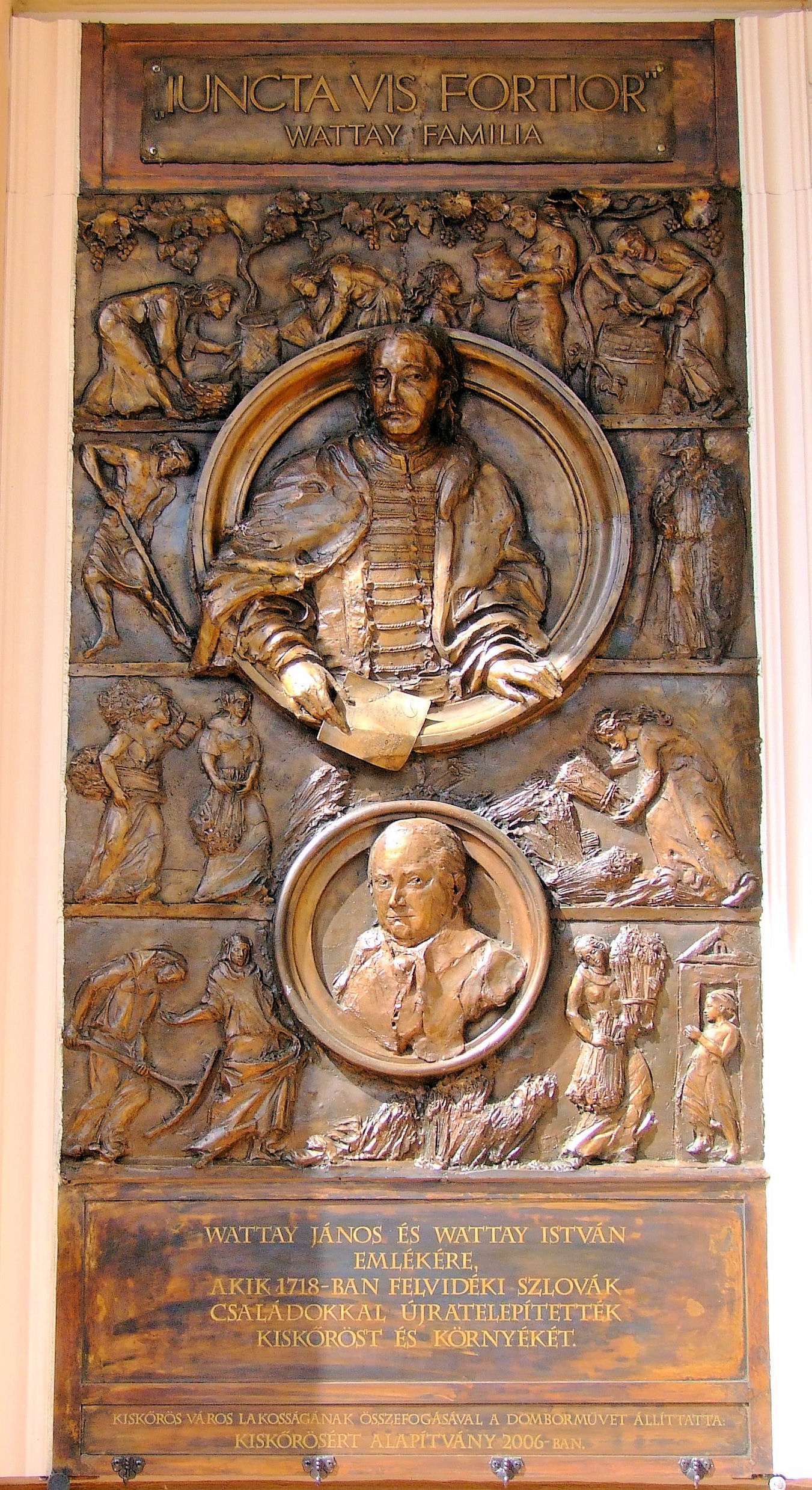 Wattay János és Wattay István domborművesemléktábla a kiskőrösi városházán. (A Wattayak 1718-ban felvidéki szlovák családokkal telepítették újra Kiskőröst és környékét) Máté István szobrászművész alkotása (2006)